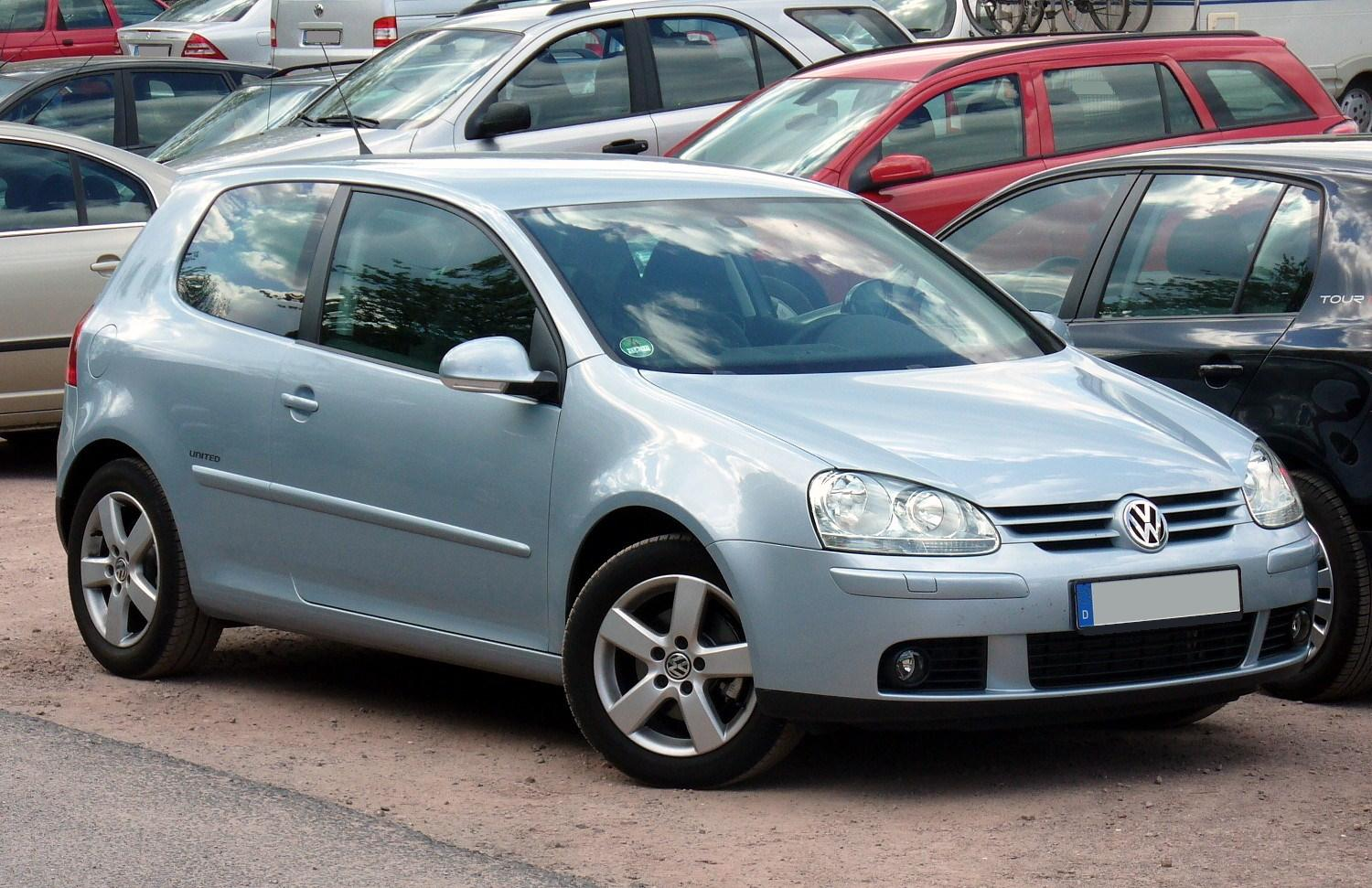 VW Golf V